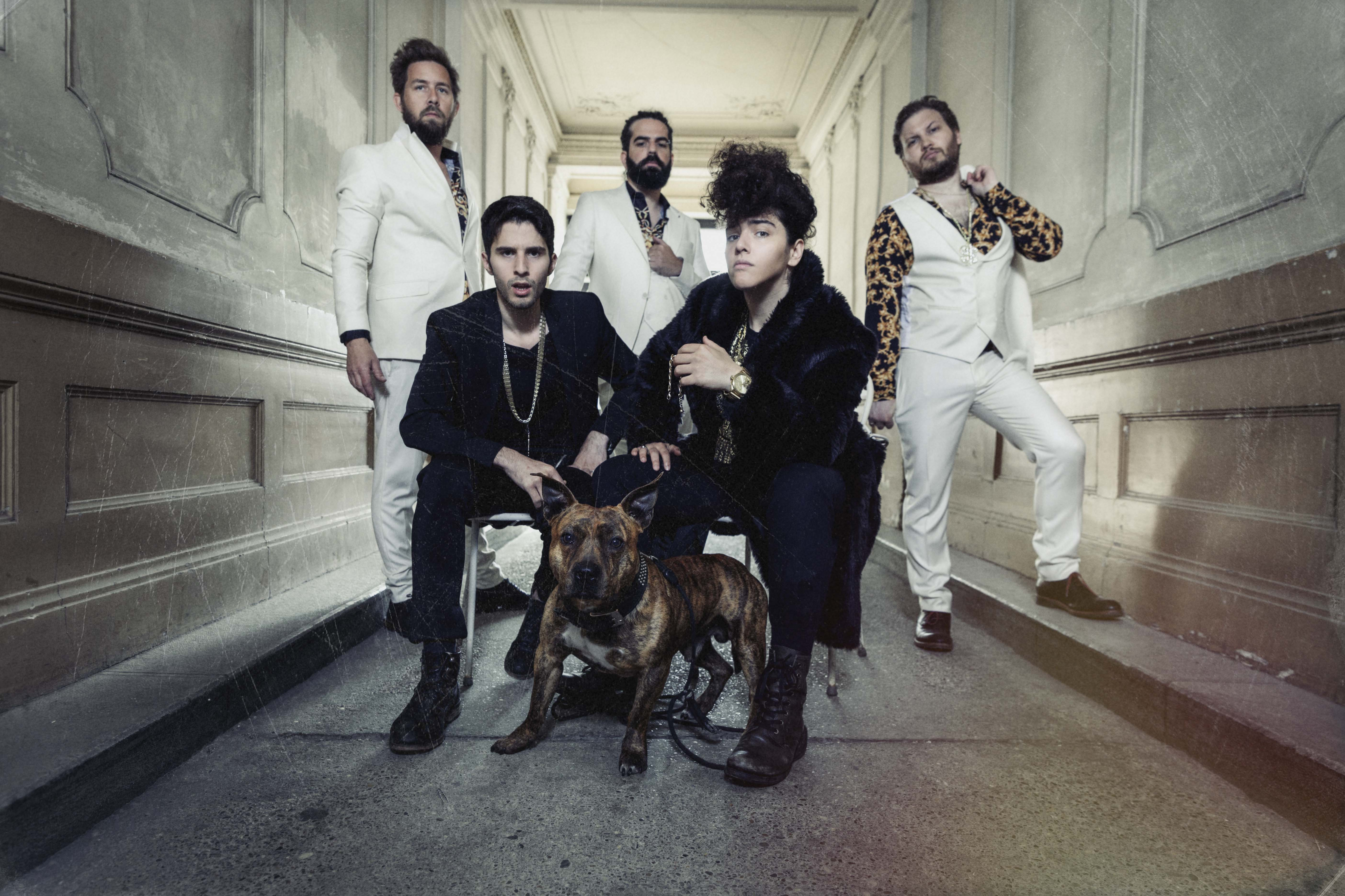 Esra und Enes Özmen sind die neuen Leadsänger der Formation Gasmac GIlmore.